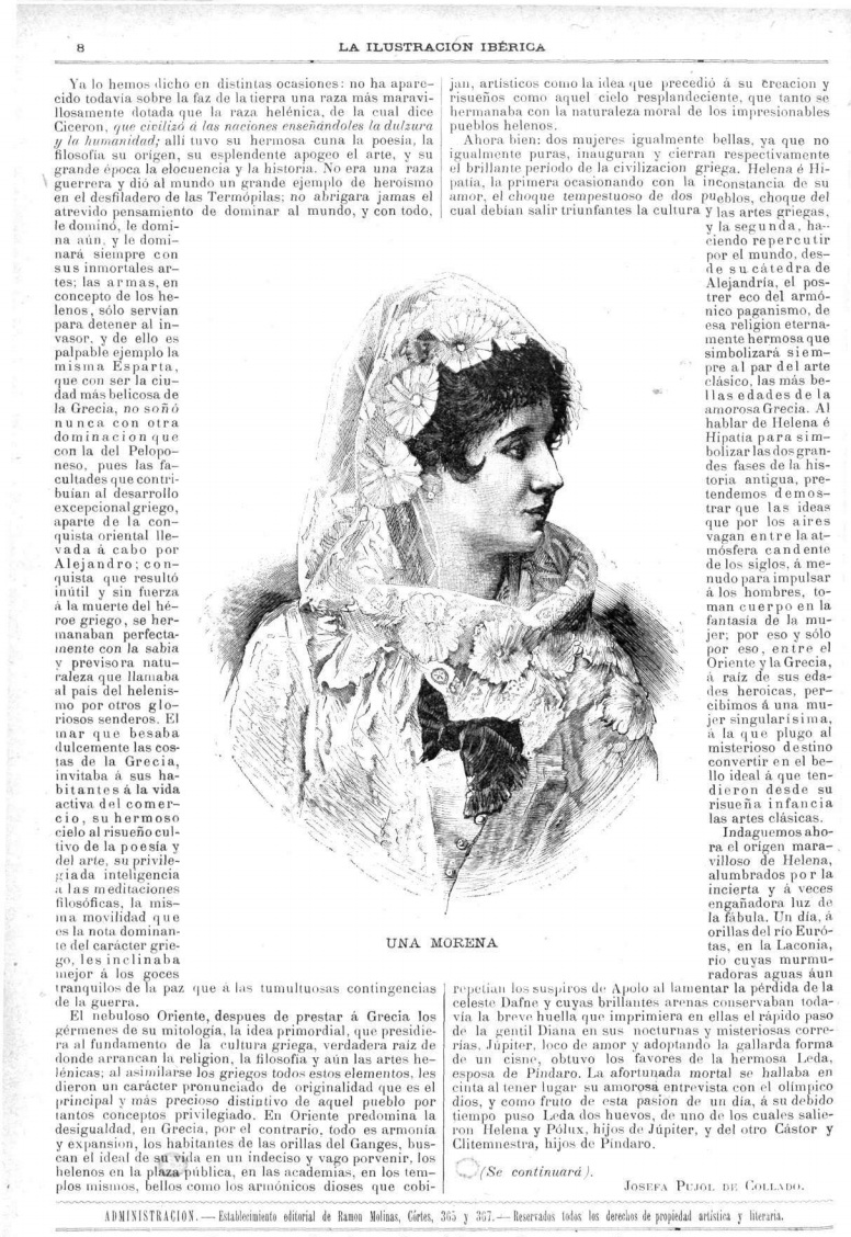 Format de la primera etapa de la revista